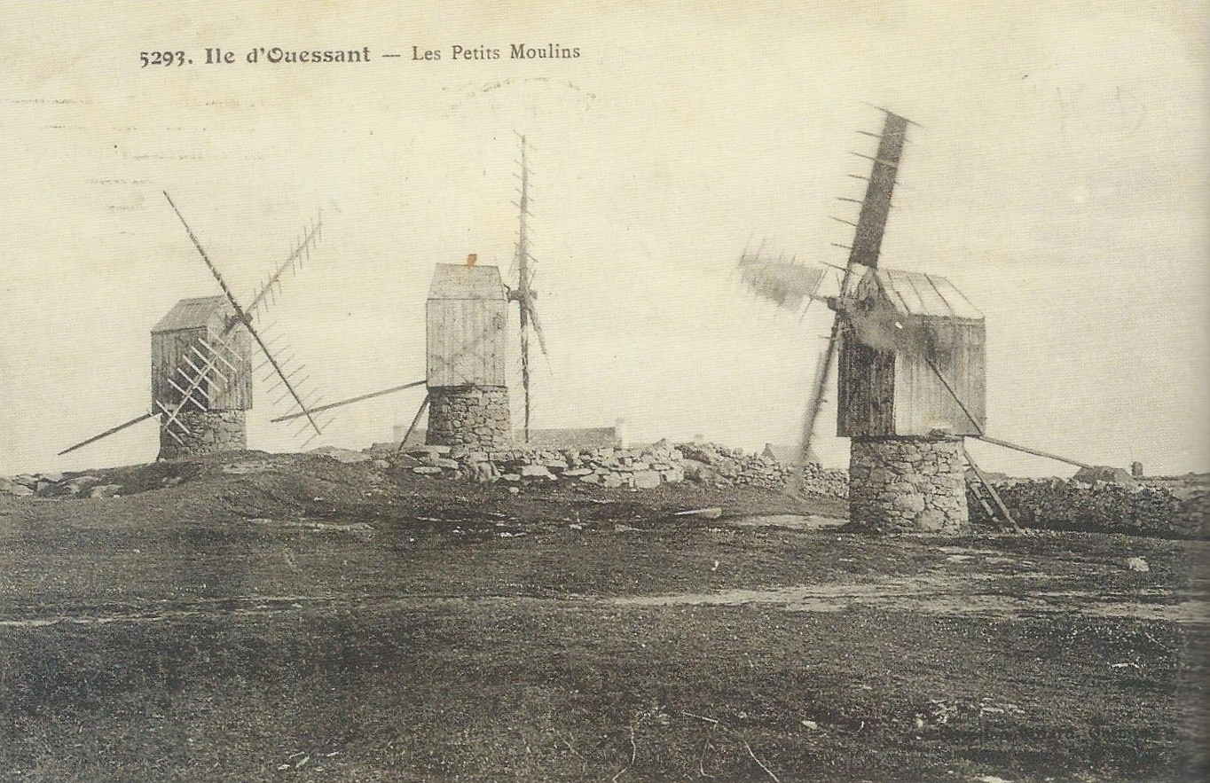 Ouessant : Les petits moulins familiaux traditionnels, détruits pour la plupart entre 1926 et 1939 (carte postale, avant 1939, éditions Villard [Joseph-Marie Villard 1868-1935])